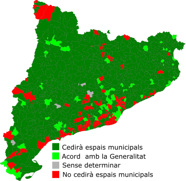 Posicionament dels municipis catalans respecte el referèndum de l'u d'octubre. En verd fosc: municipis favorables a cedir espais pel referèndum i a col·laborar amb el Govern de la Generalitat; en vermell: municipis contraris a cedir espais pel referèndum ni a col·laborar amb el Govern de la Generalitat; en verd clar: municipis amb acords de col·laboració amb el Govern de la Generalitat en relació al referèndum; en gris: municipis sense pronunciar-se.